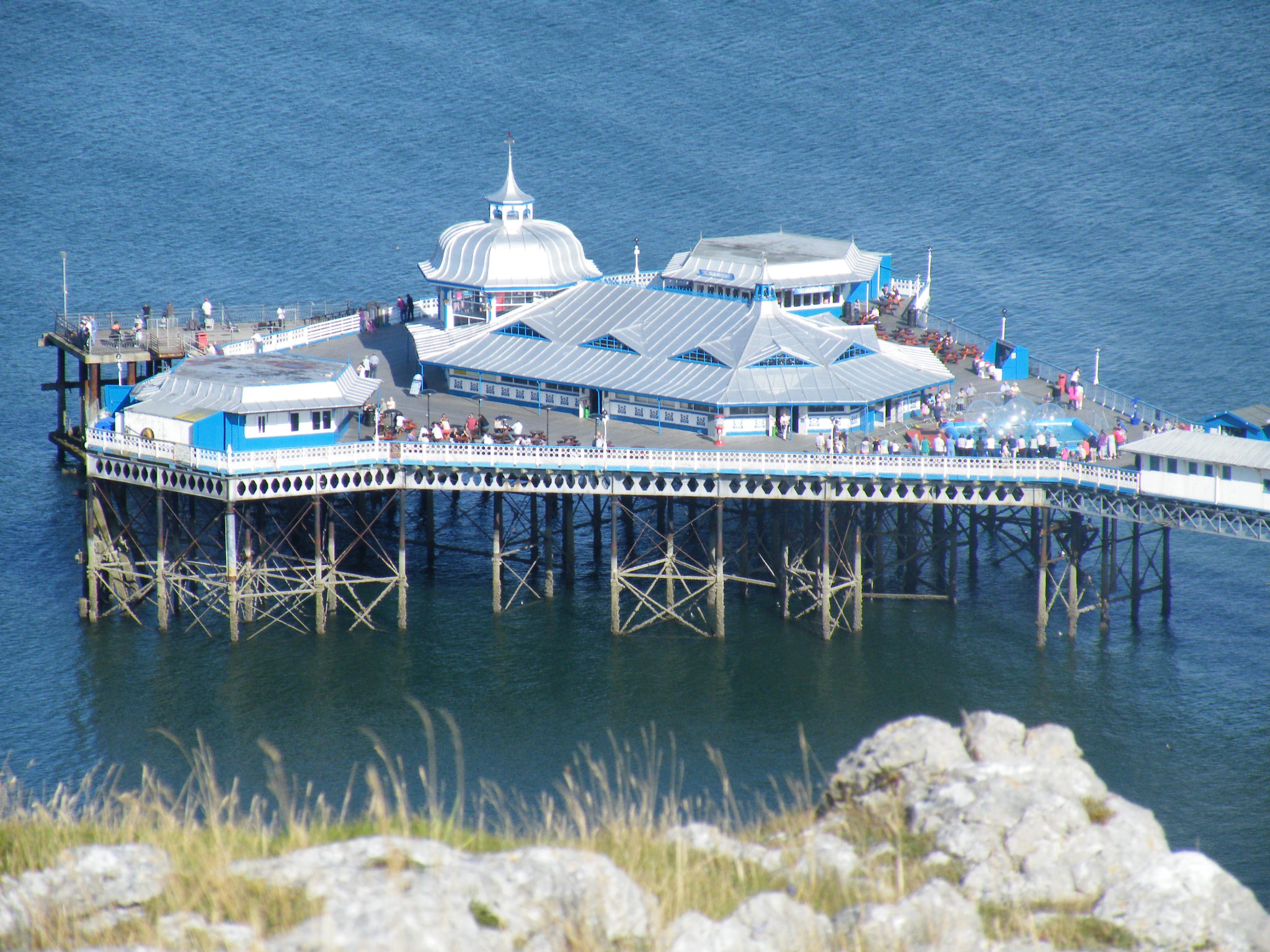 y pier